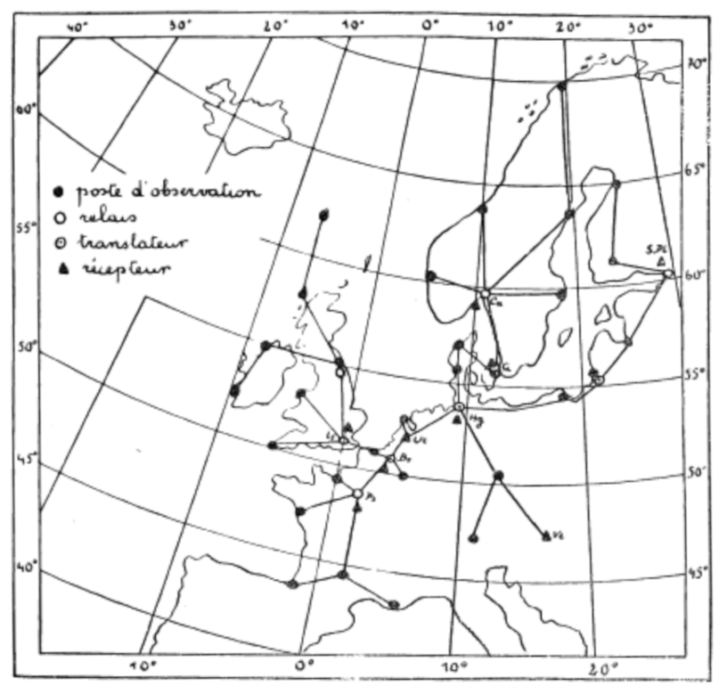 Projet de télémétéorographie internationale - F. Van Rysselberghe (1846-1893)